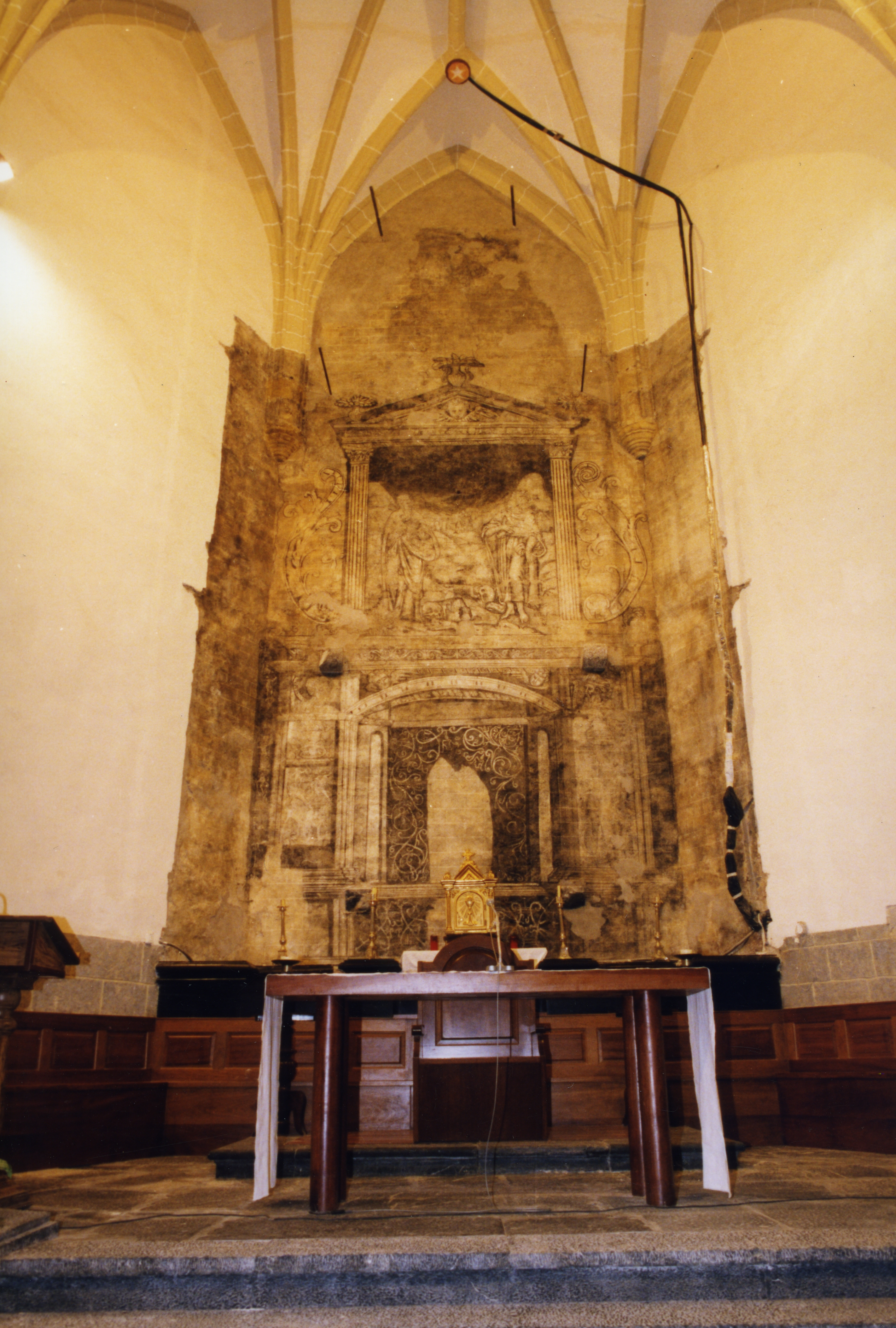 1540. urteko grisalla edo margoa. Aiurri 34 zbk. 16. orr.